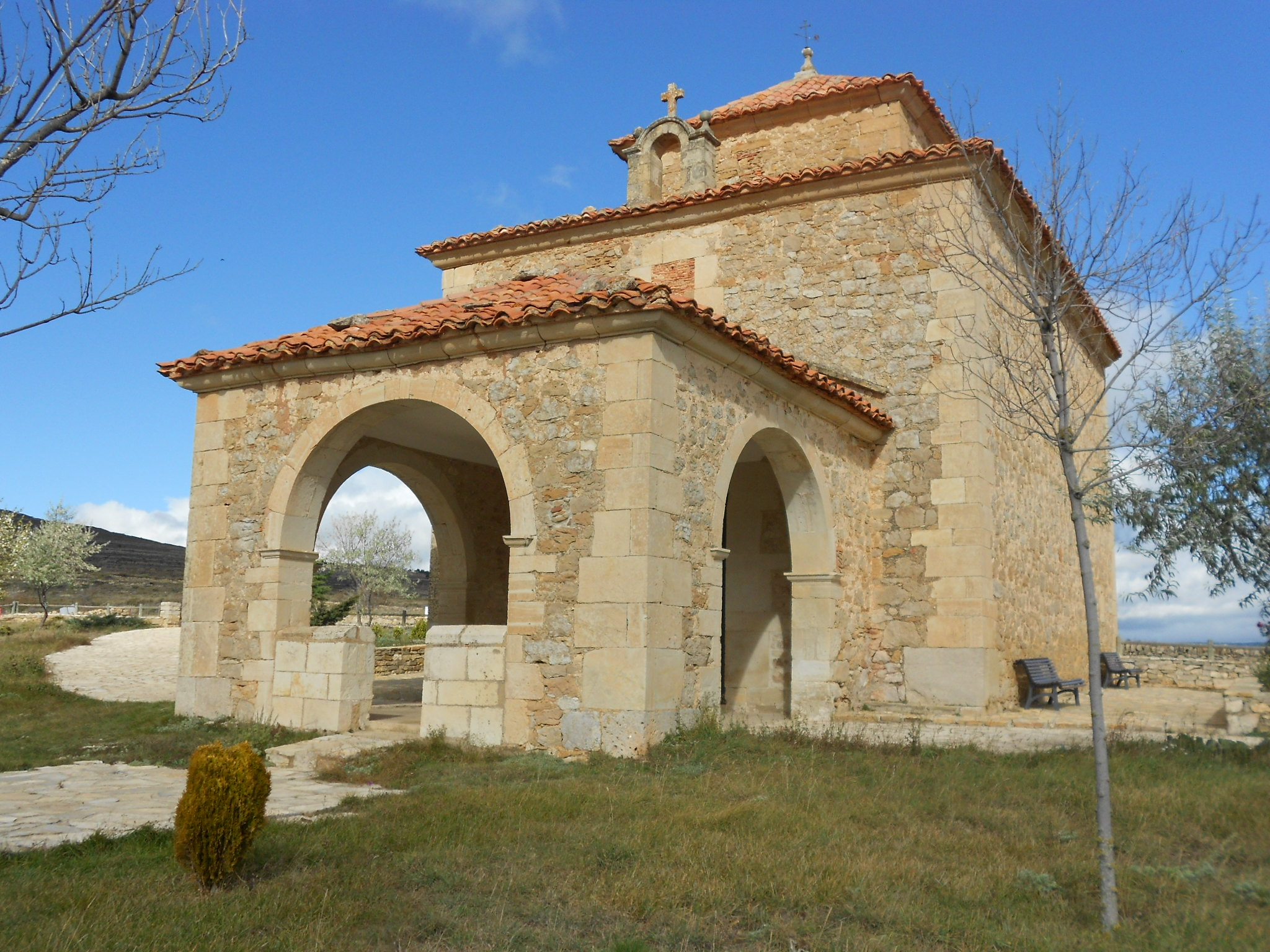 Ermita de San Lamberto (Mosqueruela, España)